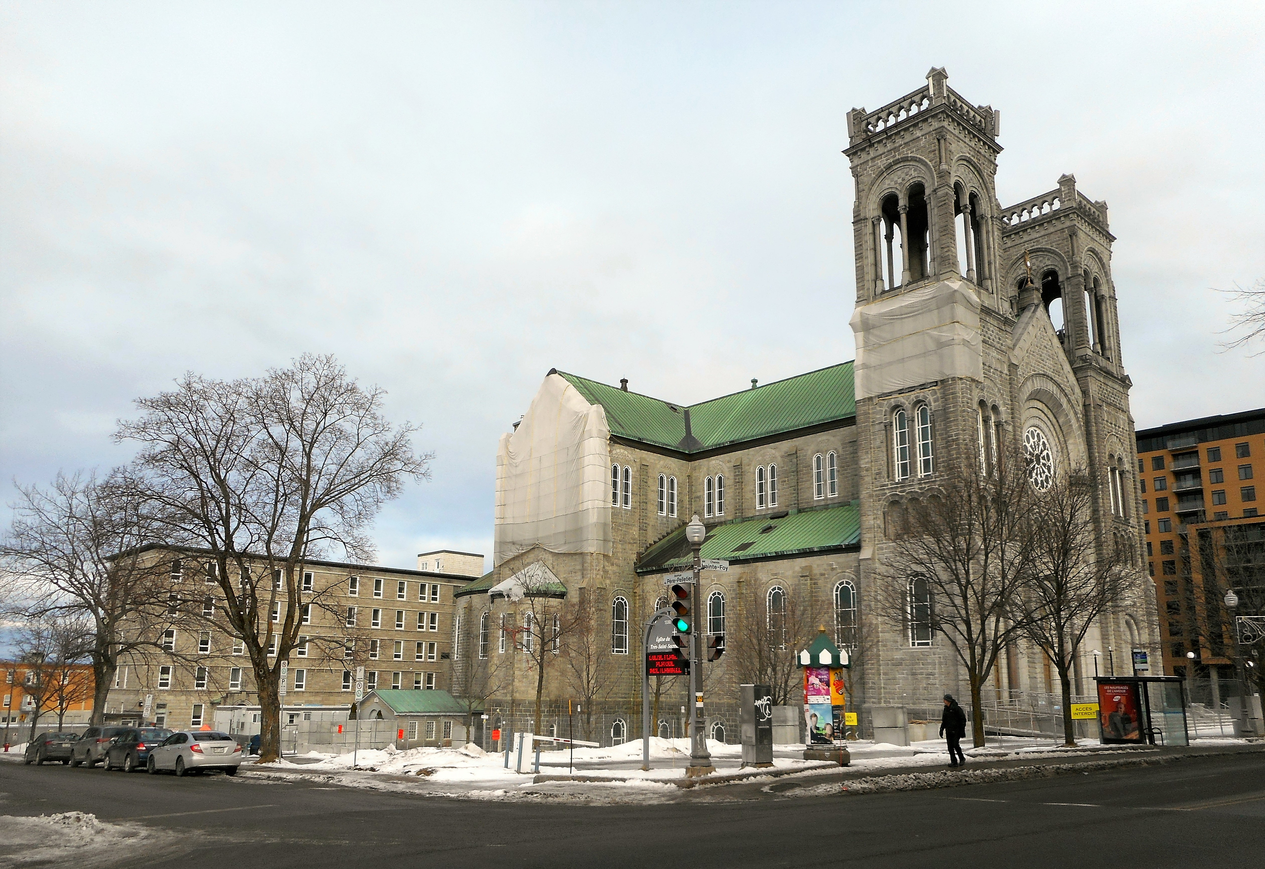 Église du Très-Saint-Sacrement (fermée), 1330, chemin Sainte-Foy, Québec